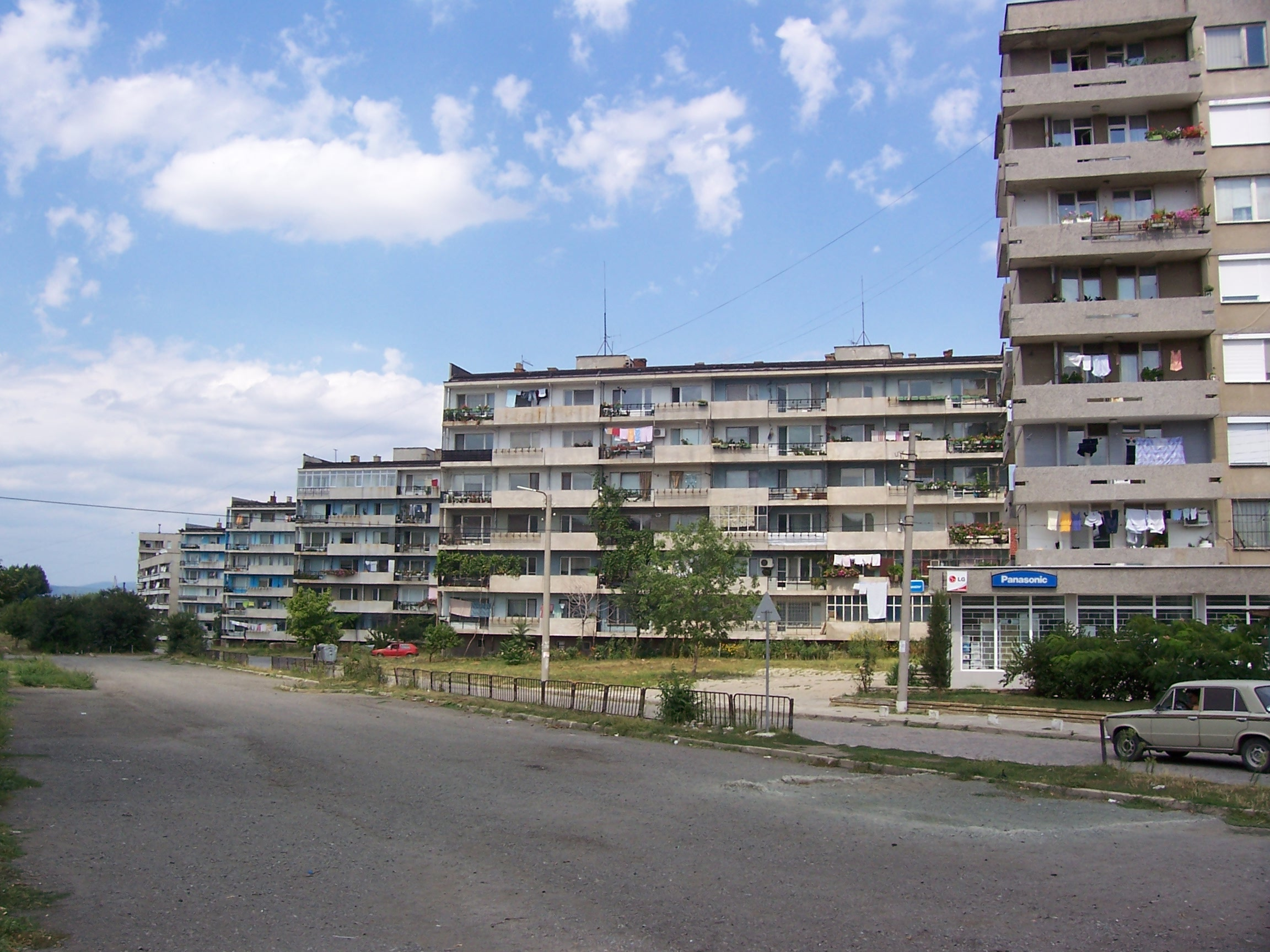 блокове на бул."Девети септември" © 2006 Димитър Колев